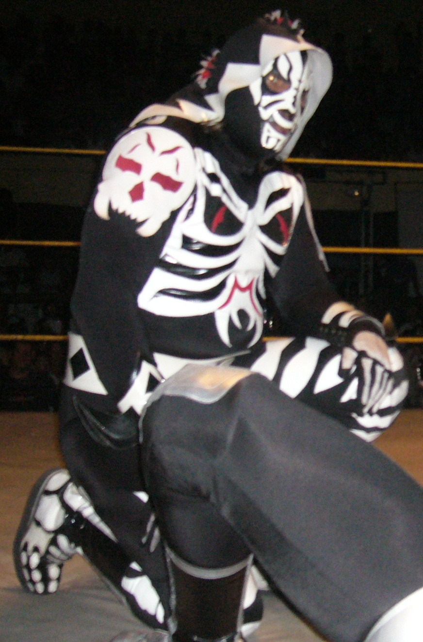 L.A. Park, luchador profesional mexicano que ha trabajado en el Consejo Mundial de Lucha Libre (CMLL) y en Asistencia Asesoría y Administración (AAA).